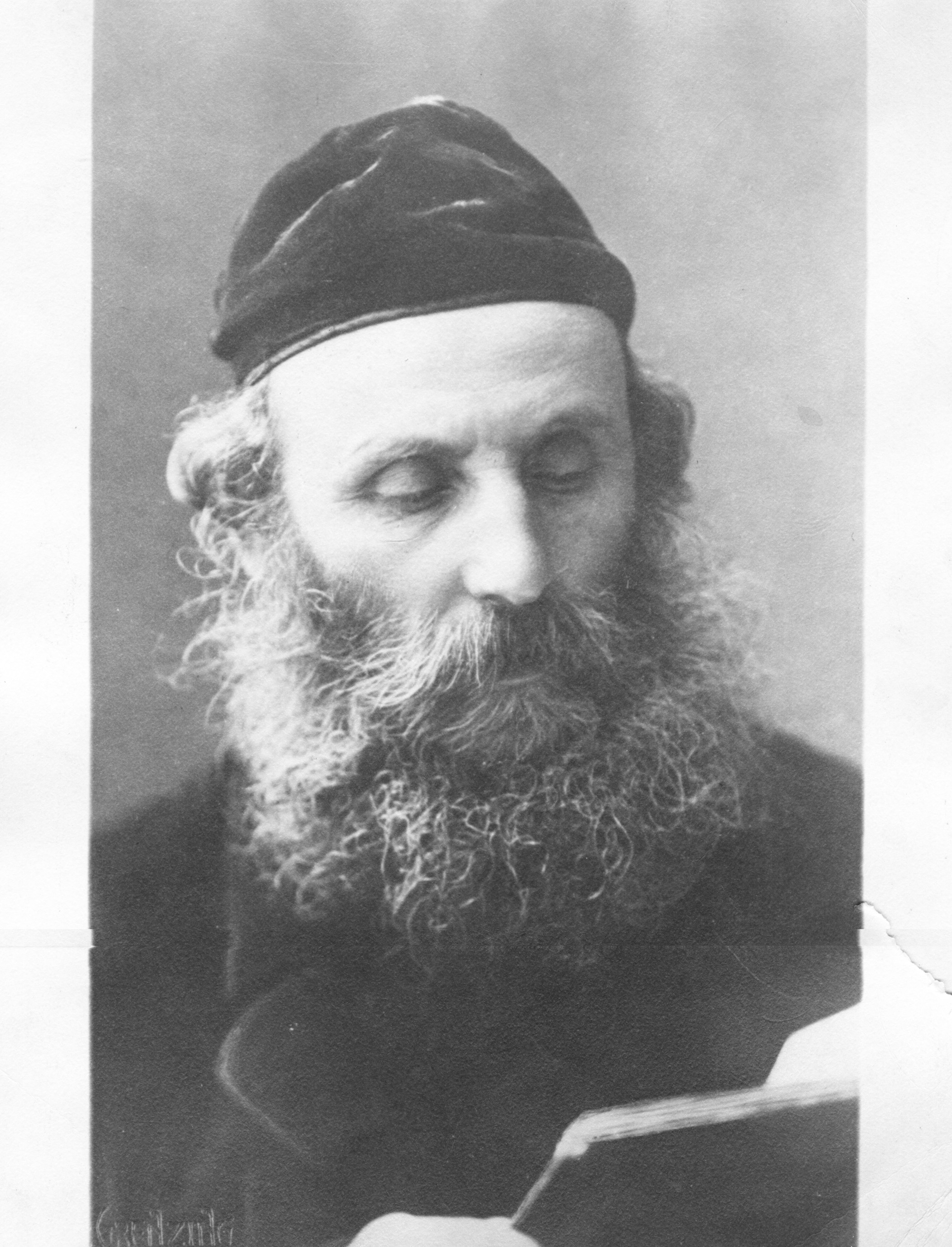 הרב יעקב משה ספיר